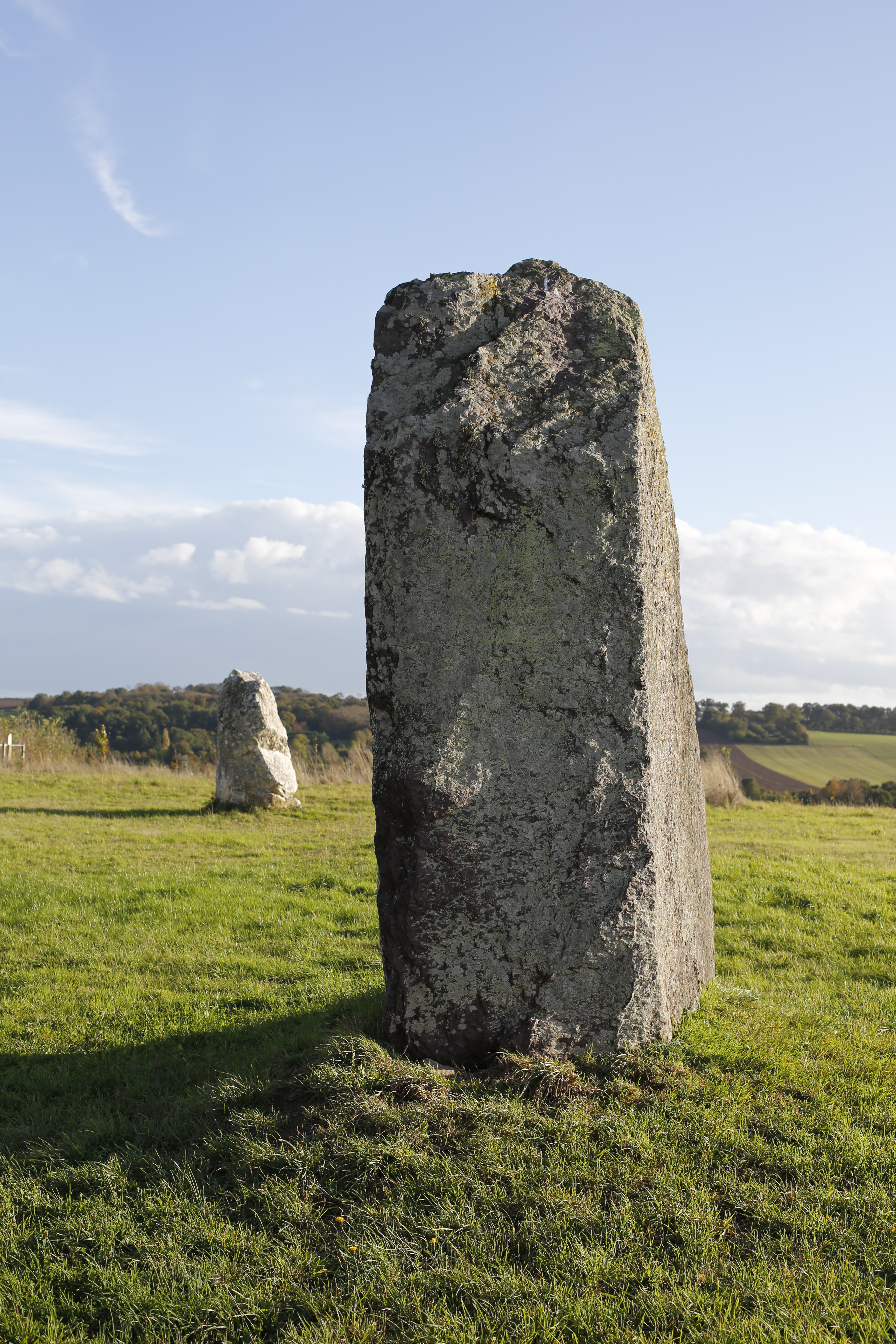 Menhir du Champ de la Pierre et menhir du Champ Horel (Le Sel-de-Bretagne, Ille-et-Vilaine, Bretagne, France).